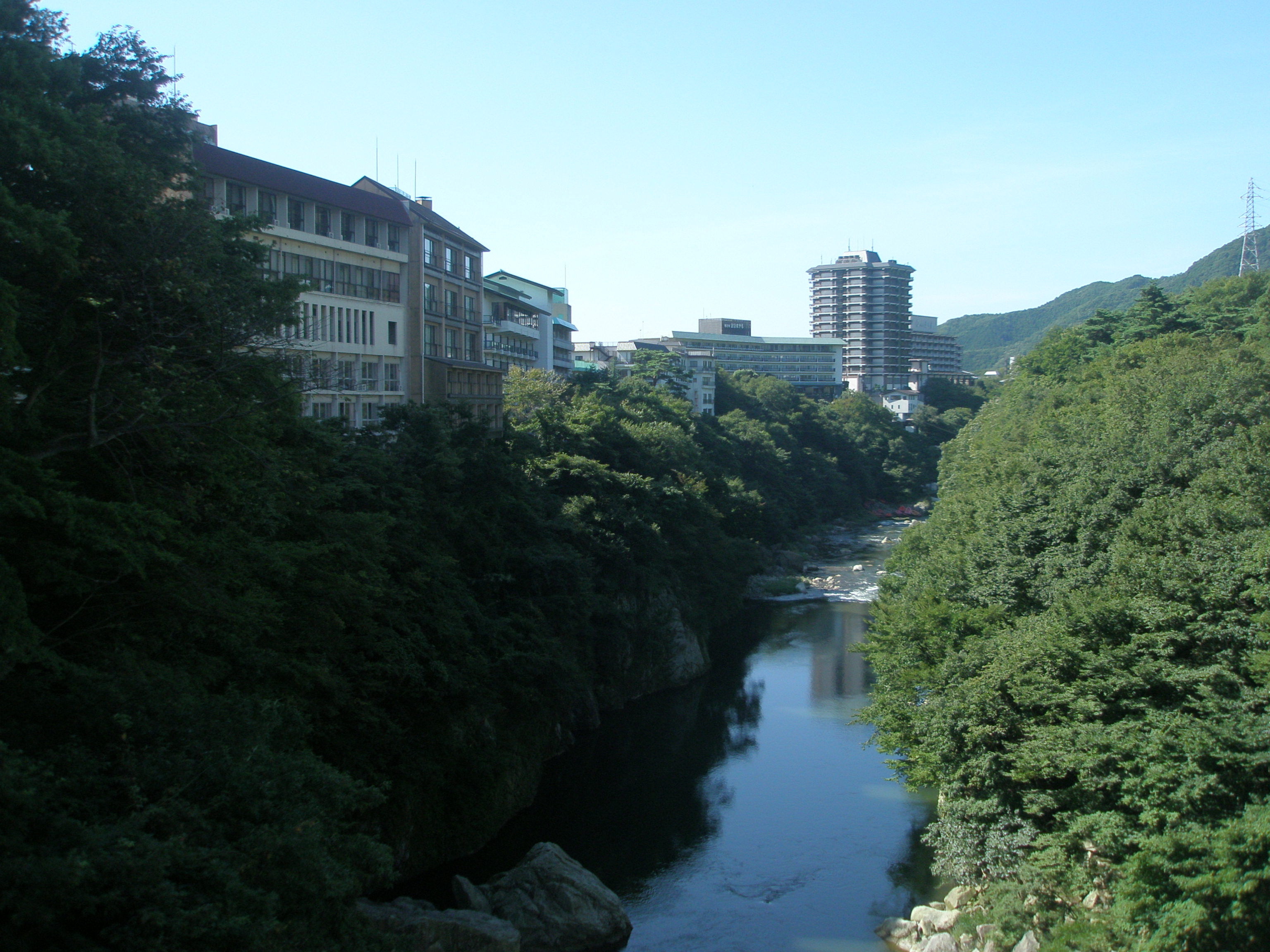 鬼怒川温泉、鬼怒川ふれあい橋より下流方